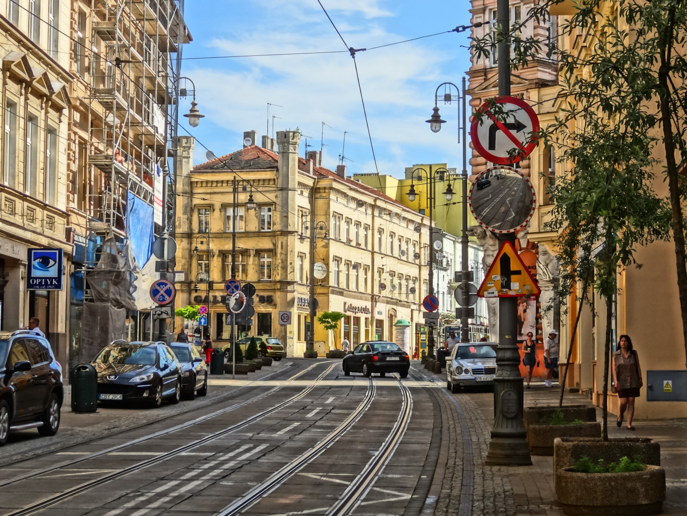 Ulica Gdańska w Bydgoszczy na odcinku między ul. Jagiellońską, a ul. Dworcową